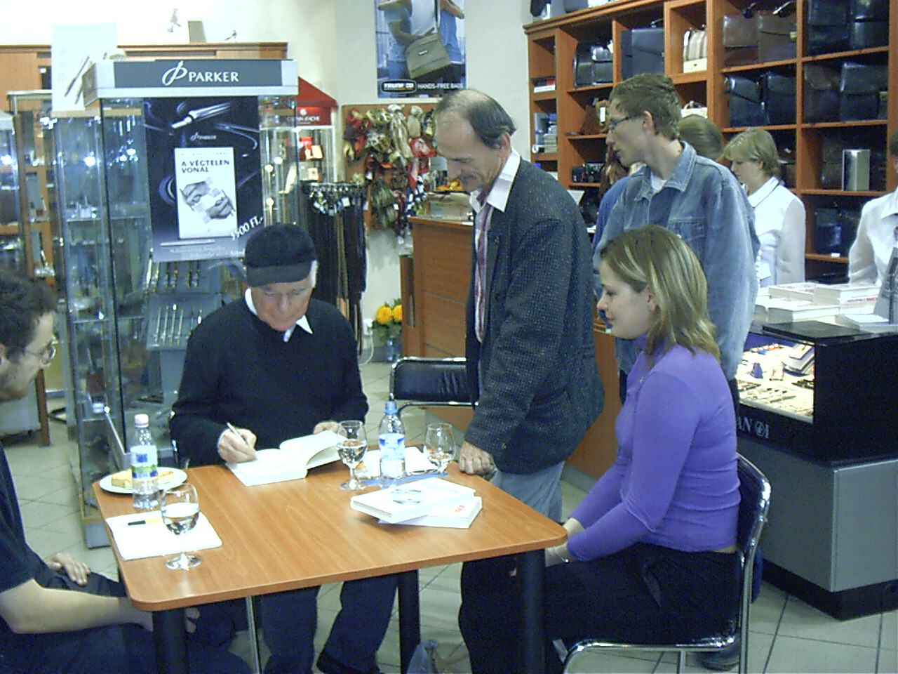 Moldova György dedikálja a Végtelen vonal (a golyóstoll regénye) című könyvét (Győr)